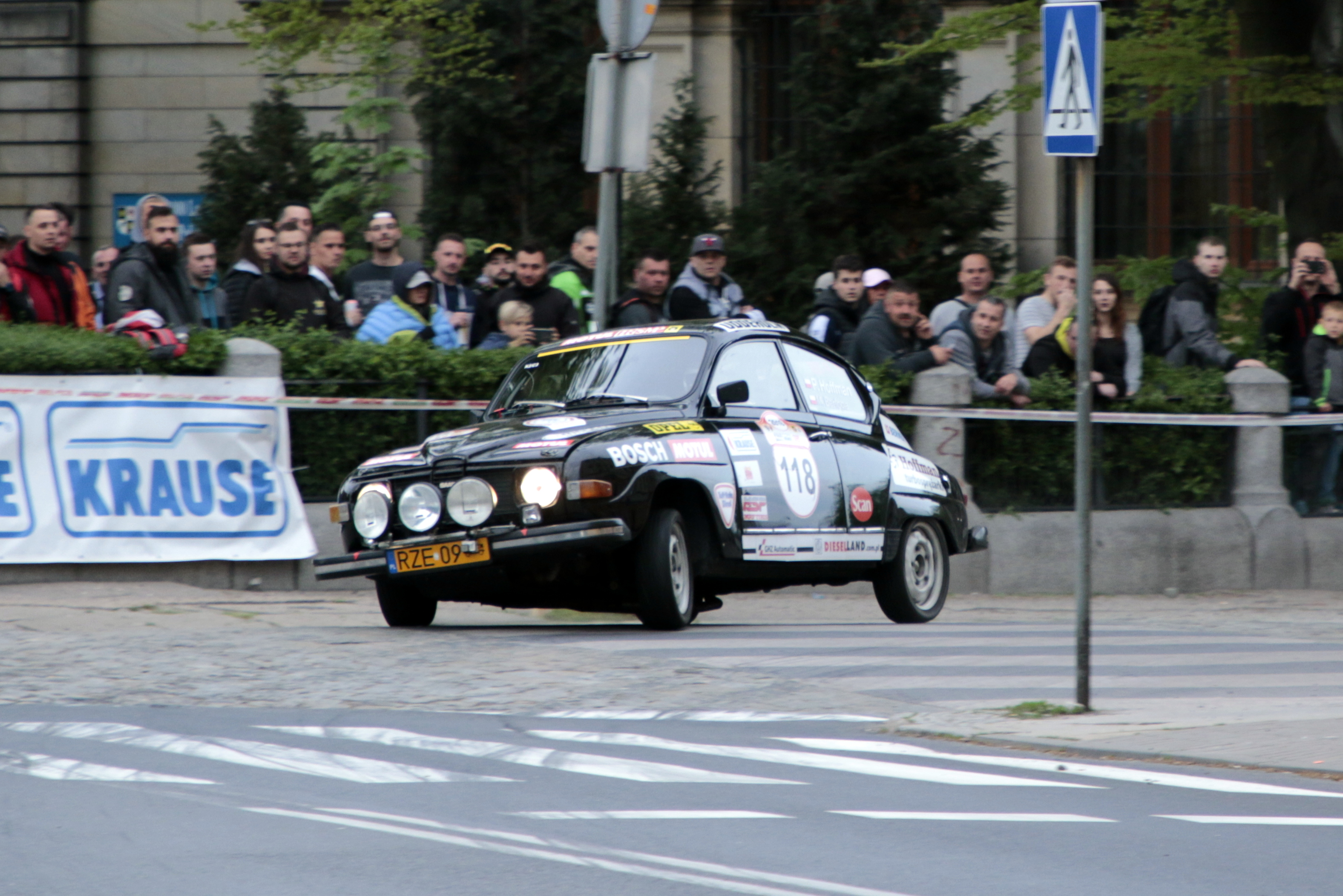 Rajd Świdnicki 2019 - Paweł HOFFMAN